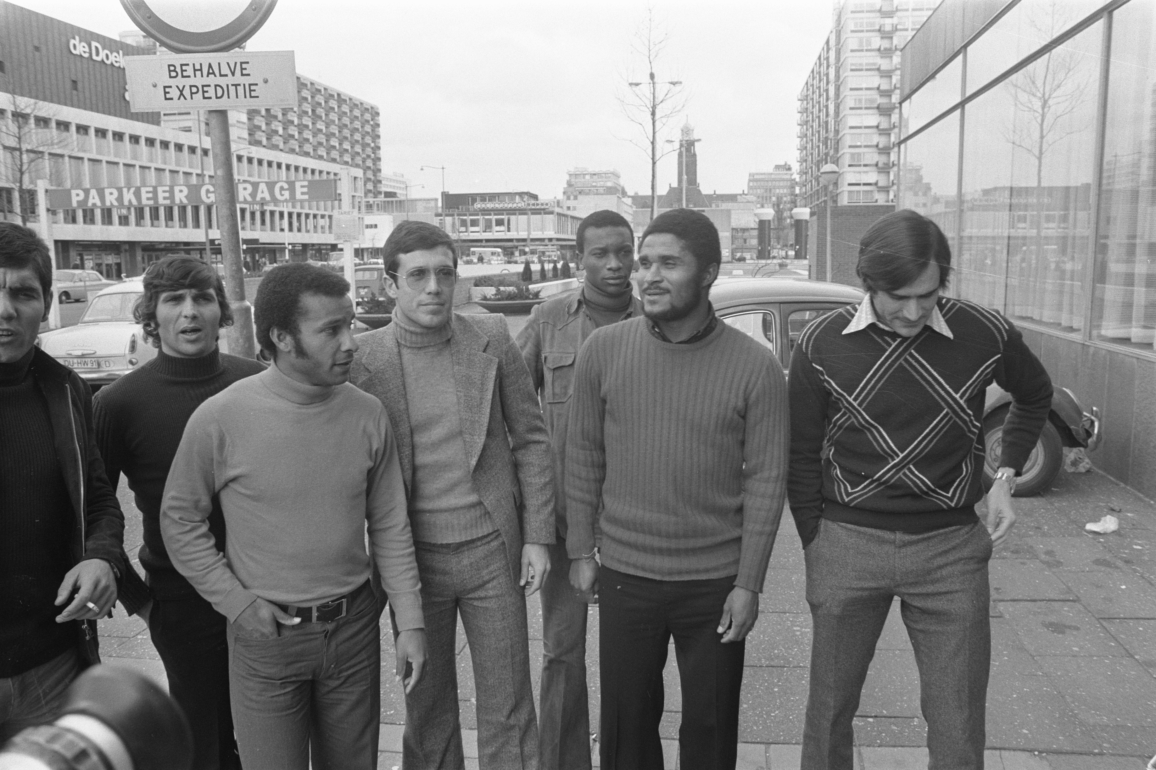 Collectie / Archief : Fotocollectie Anefo Reportage / Serie : [ onbekend ] Beschrijving : Benfica in Rotterdam voor Europacupwedstrijd tegen Feyenoord aantal Benficaspelers, 2e van rechts Eusebio Annotatie : vlnr.: Toni , Graça, Zeca, Humberto, Messias, Eusebio, Vitor Baptista Datum : 6 maart 1972 Locatie : Rotterdam, Zuid-Holland Trefwoorden : sport, voetballers Persoonsnaam : Eusebio Instellingsnaam : Benfica, Europa Cup, Feyenoord Fotograaf : Verhoeff, Bert / Anefo Auteursrechthebbende : Nationaal Archief Materiaalsoort : Negatief (zwart/wit) Nummer archiefinventaris : bekijk toegang 2.24.01.05 Bestanddeelnummer : 925-4359